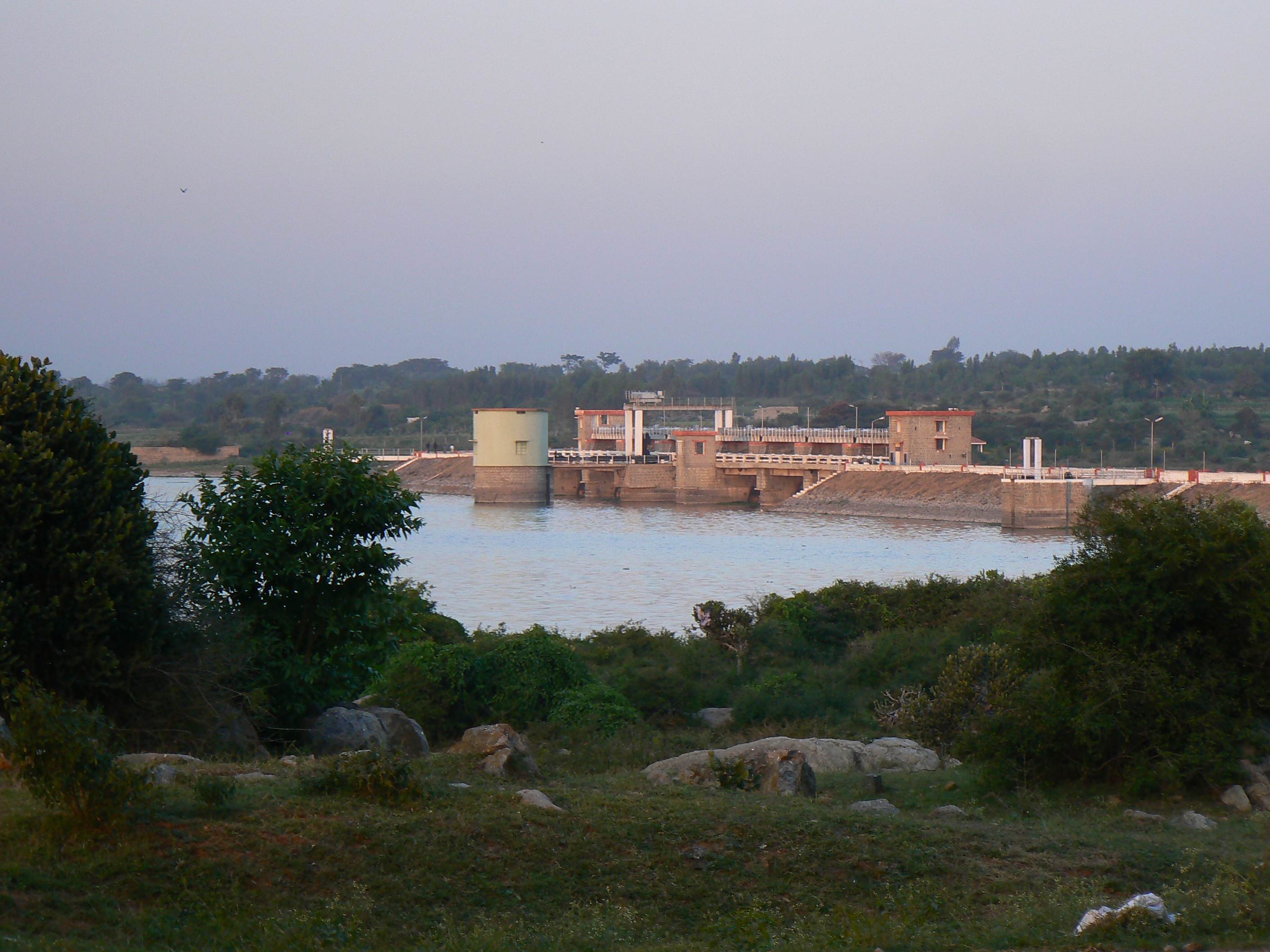 Near Avalapalli, on Kalavarapelli Reservoir near Hosur, Tamil Nadu